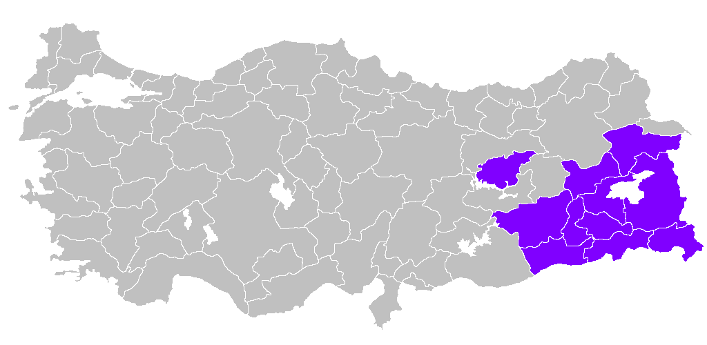 Турски Кюрдистан